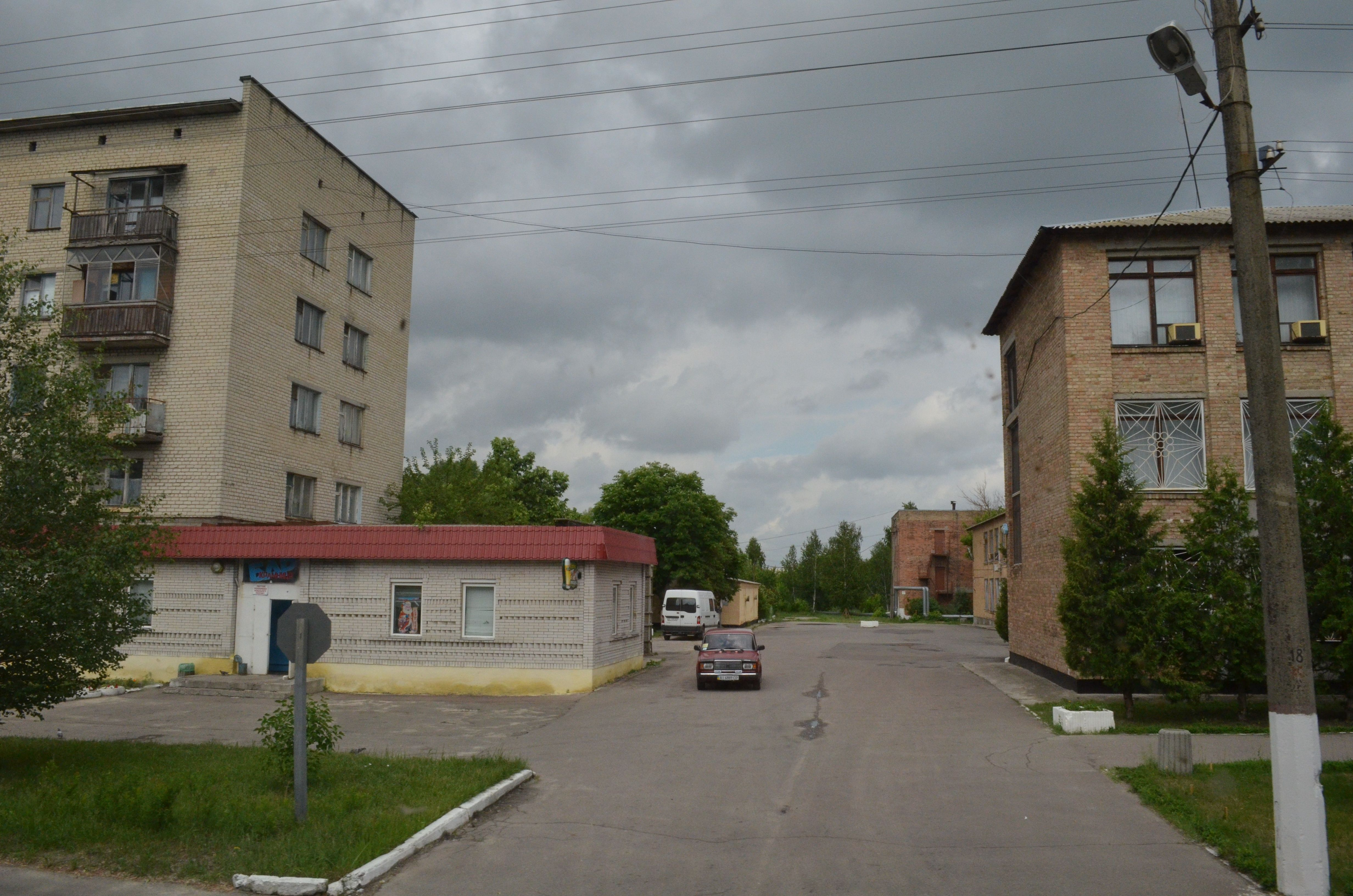 Вікіекспедиція до Чорнобиля 2013